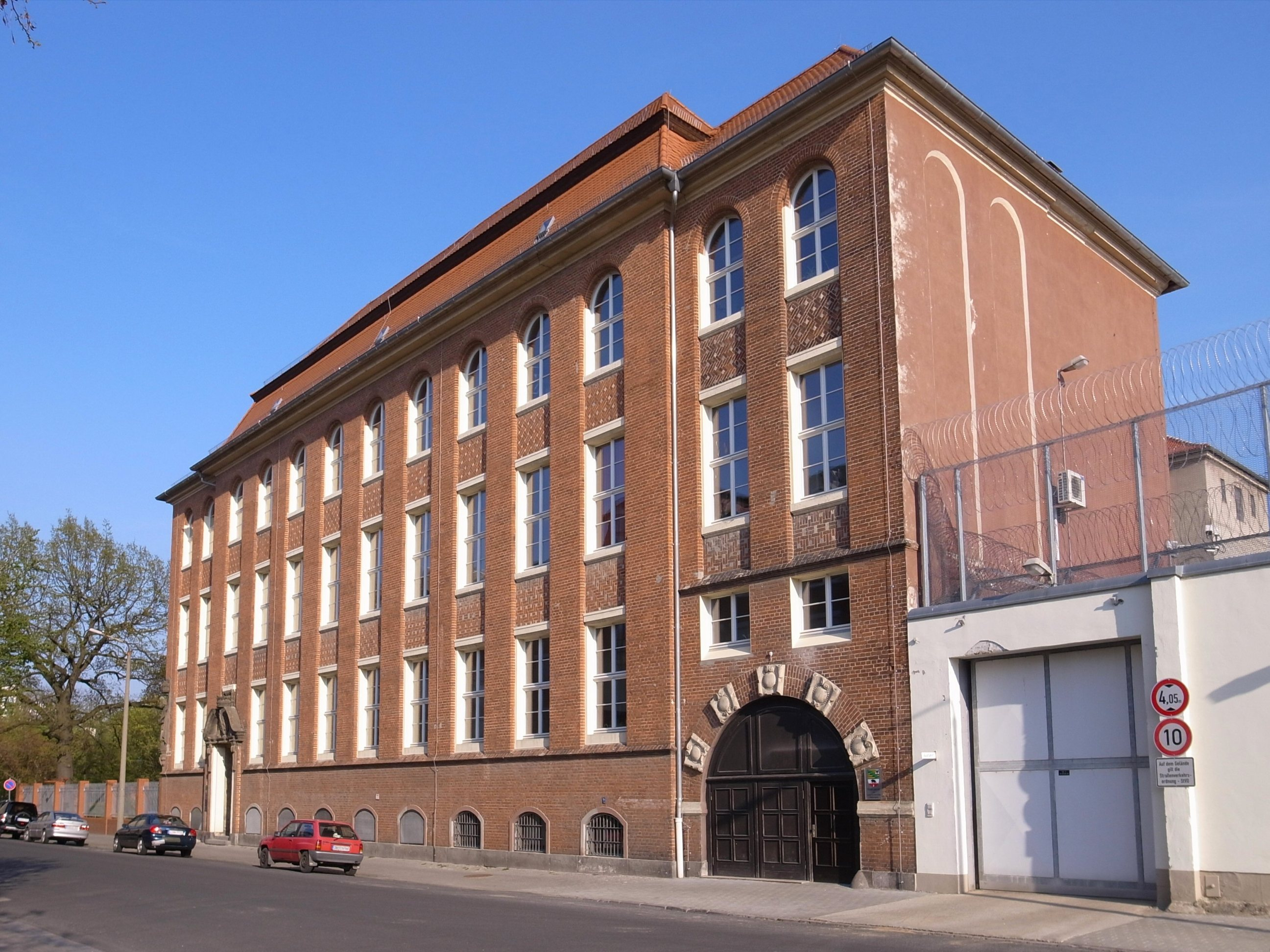 Dessau-Roßlau, Finanzgericht des Landes Sachsen-Anhalt, Dienstgebäude in der Mariannenstraße 35